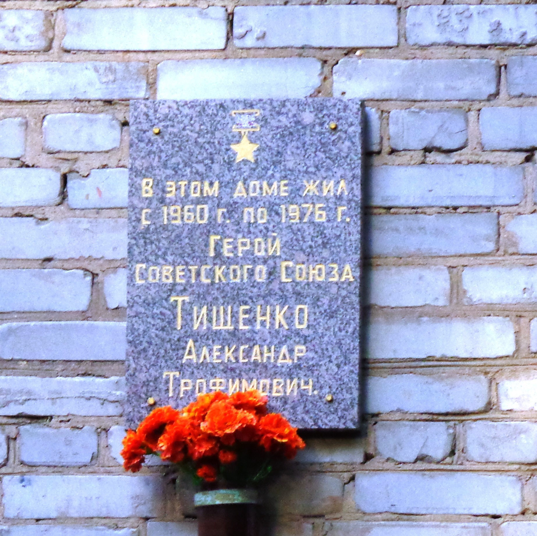 Мемориальная доска на доме в поселке Монино Московской области, где проживал Герой Советского Союза А.Т. Тищенко